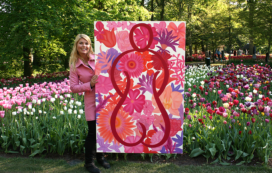 Donna Corbani met olieverfschilderij, "Symphony of Flowers" tijdens haar expositie in de Keukenhof (2011)